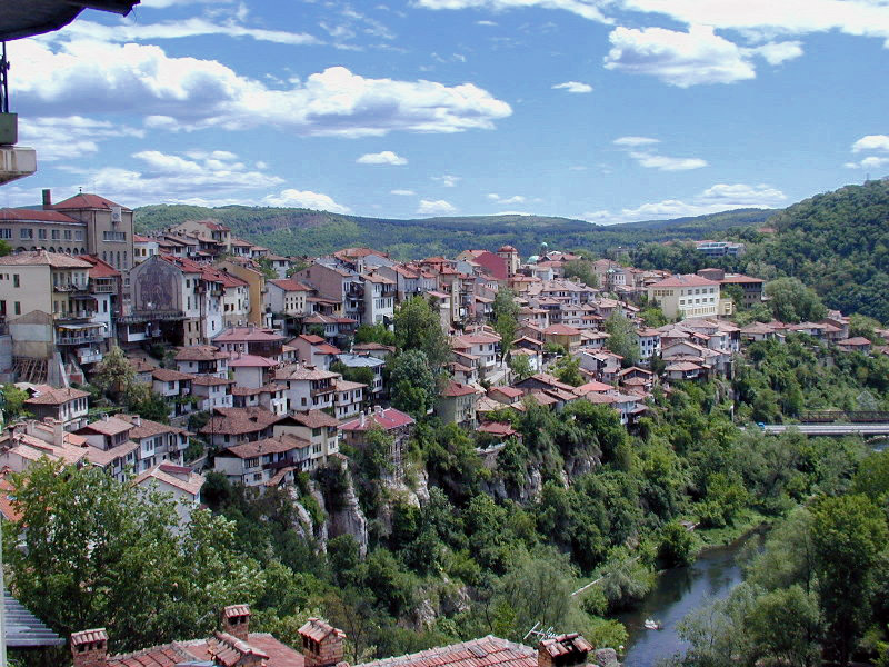 Veliko Tarnovo, Bulgaria